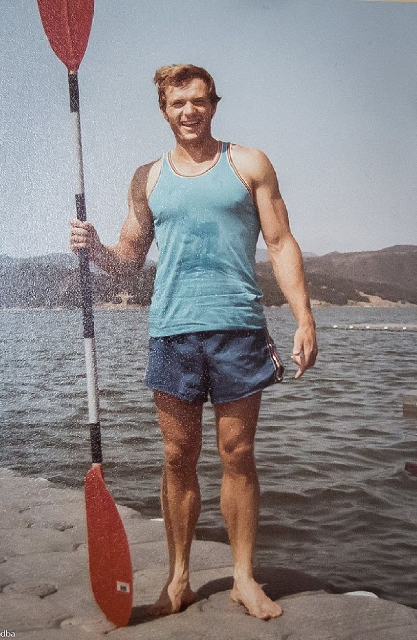 Vasile Dîba